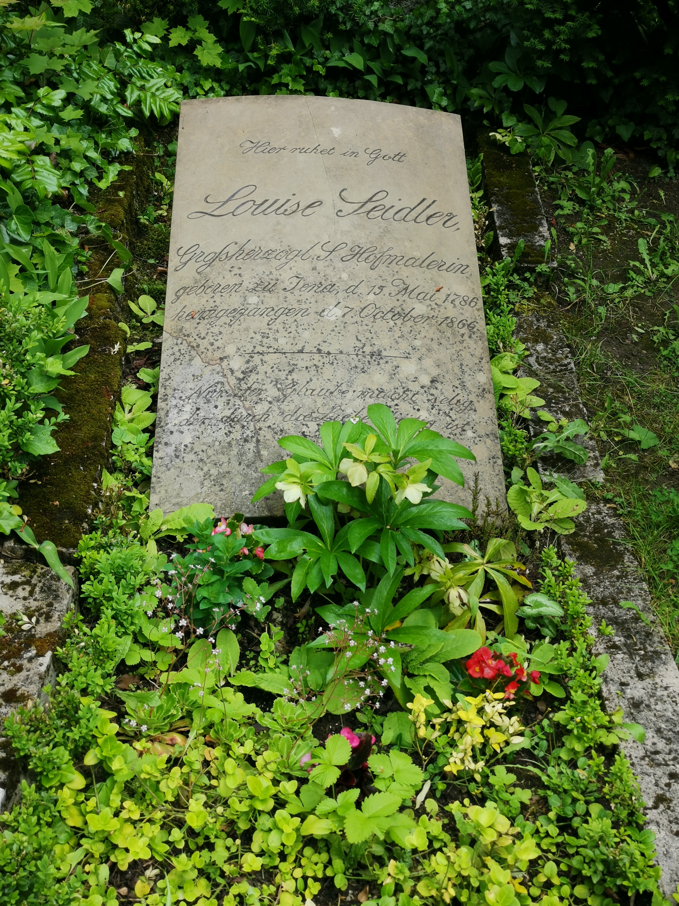 Grabstätte Louise Seidler; Historischer Friedhof Weimar